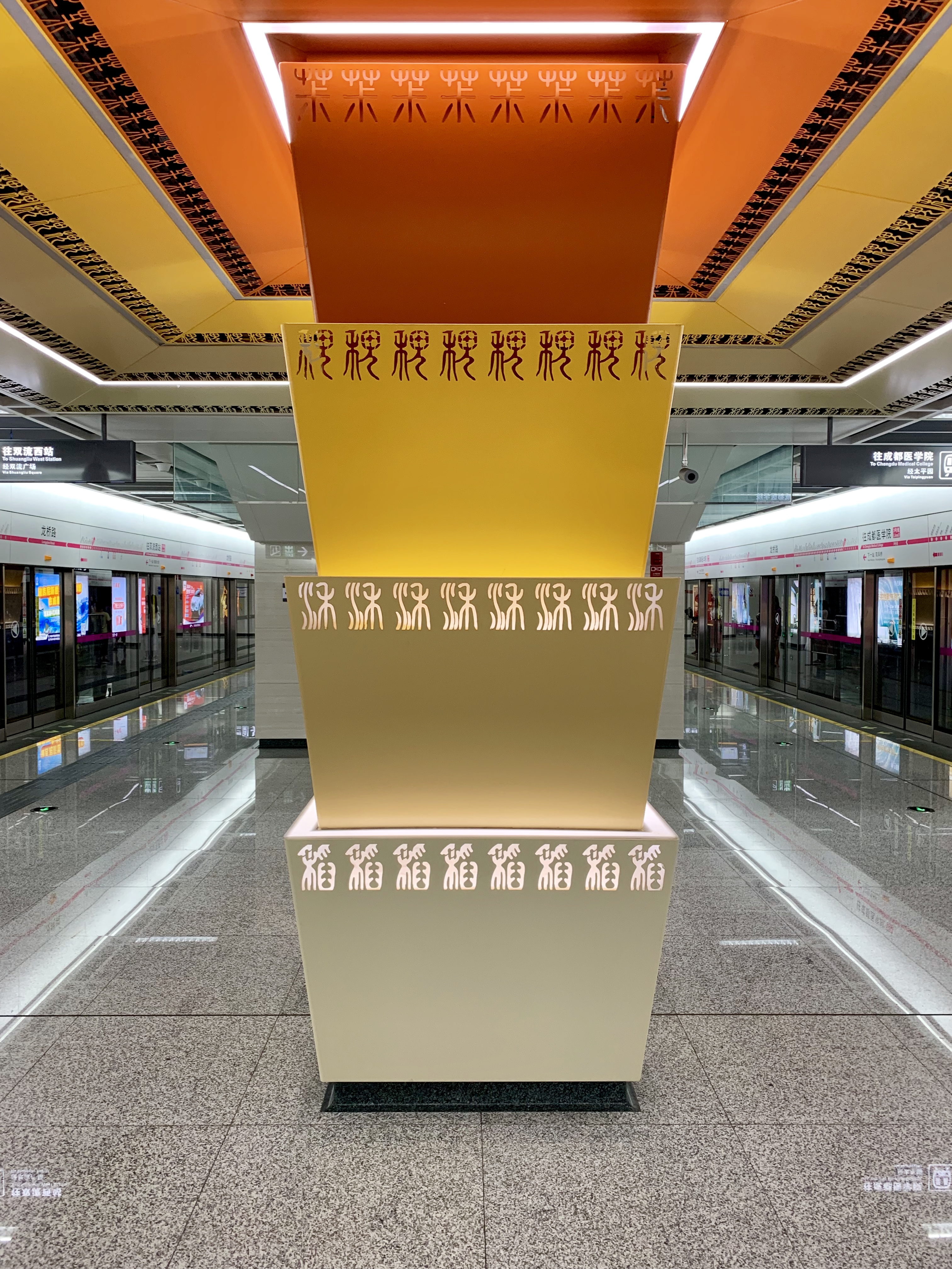 成都地铁龙桥路站